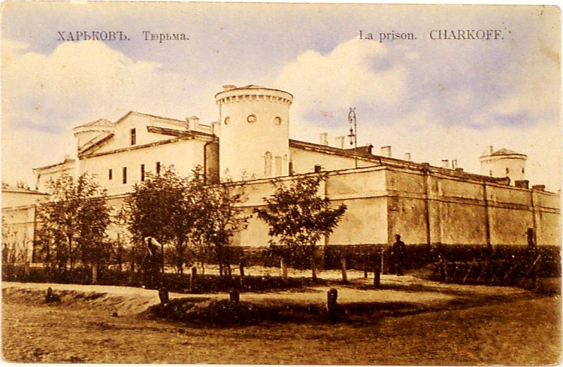 Харківський тюремний замок. Поштова листівка